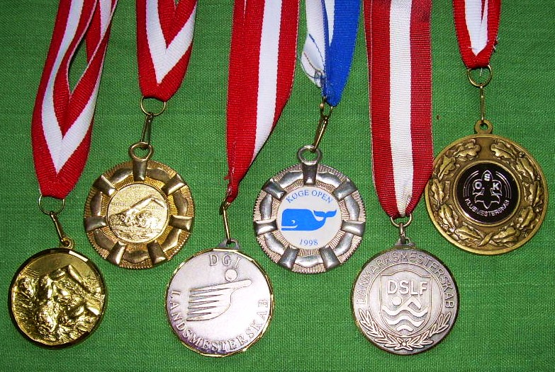 Swimming medals